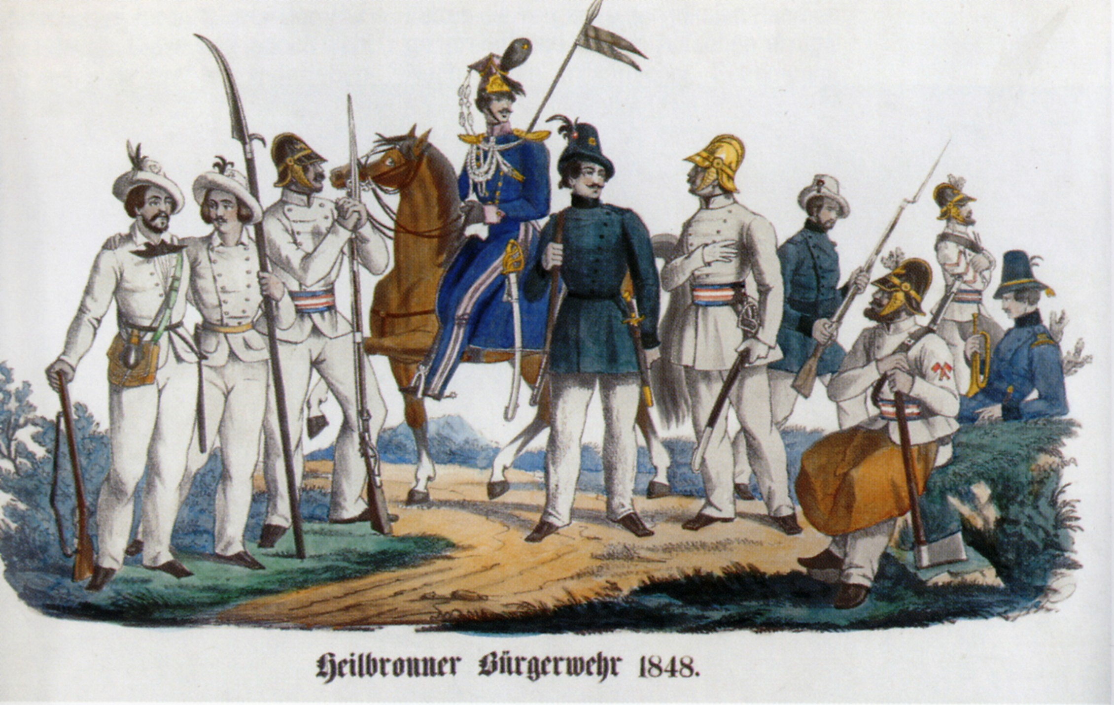 Kolorierte Lithografie, die Repräsentanten der verschiedenen Bestandteile der Heilbronner Bürgerwehr im Jahr 1848 zeigt. Von links nach rechts: Turnerschütze, Turnersensenträger, Pompierwehrmann, Adjudant der reitenden Bürgerwehr, Oberjäger der Scharfschützenwehr, Feuerwehroffizier, Scharfschütze, Pompier-Sappeur, Feuerwehrtrommler, Scharfschützenhornist. Nicht im Bild vertreten: Die Wehrmänner des 1. Banners, erkenntlich an einem “Käppi”.